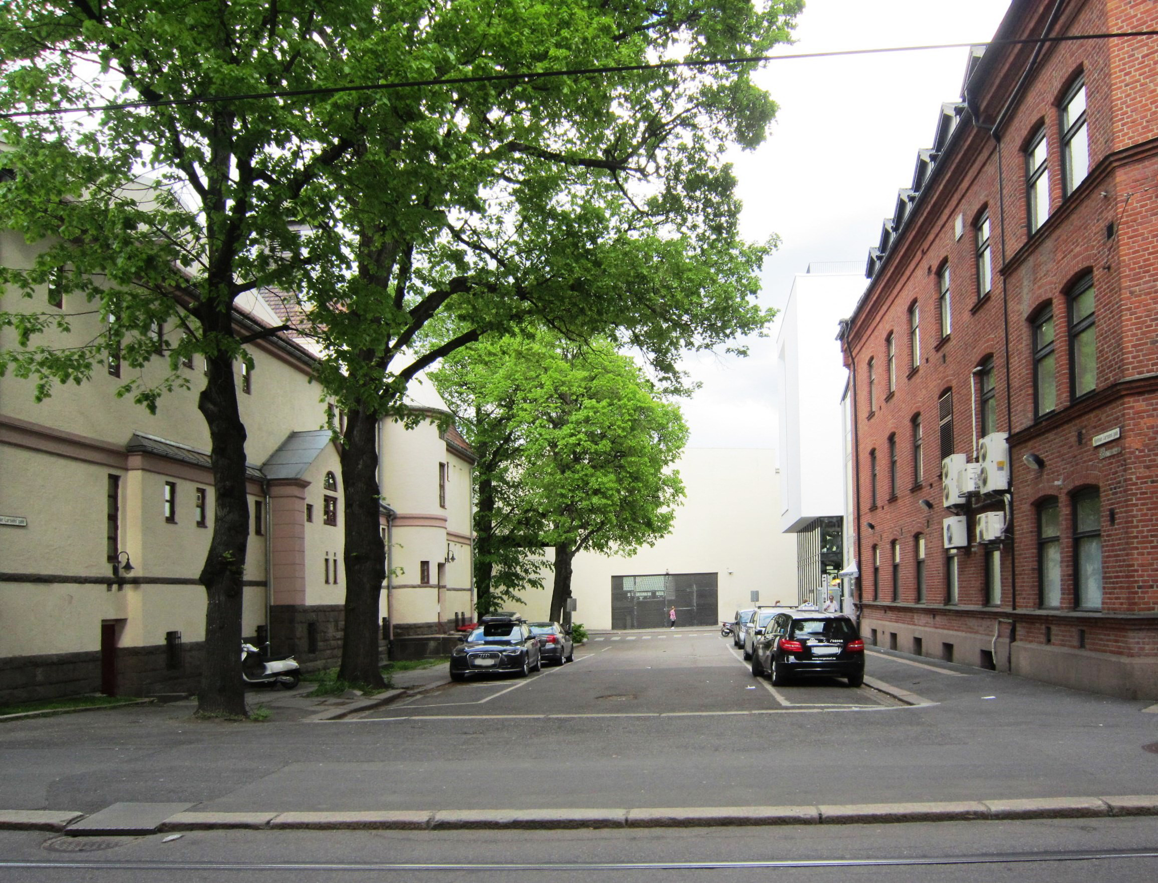 Hjalmar Larsens gate bak Bislett bad (bydell St. Hanshaugen)